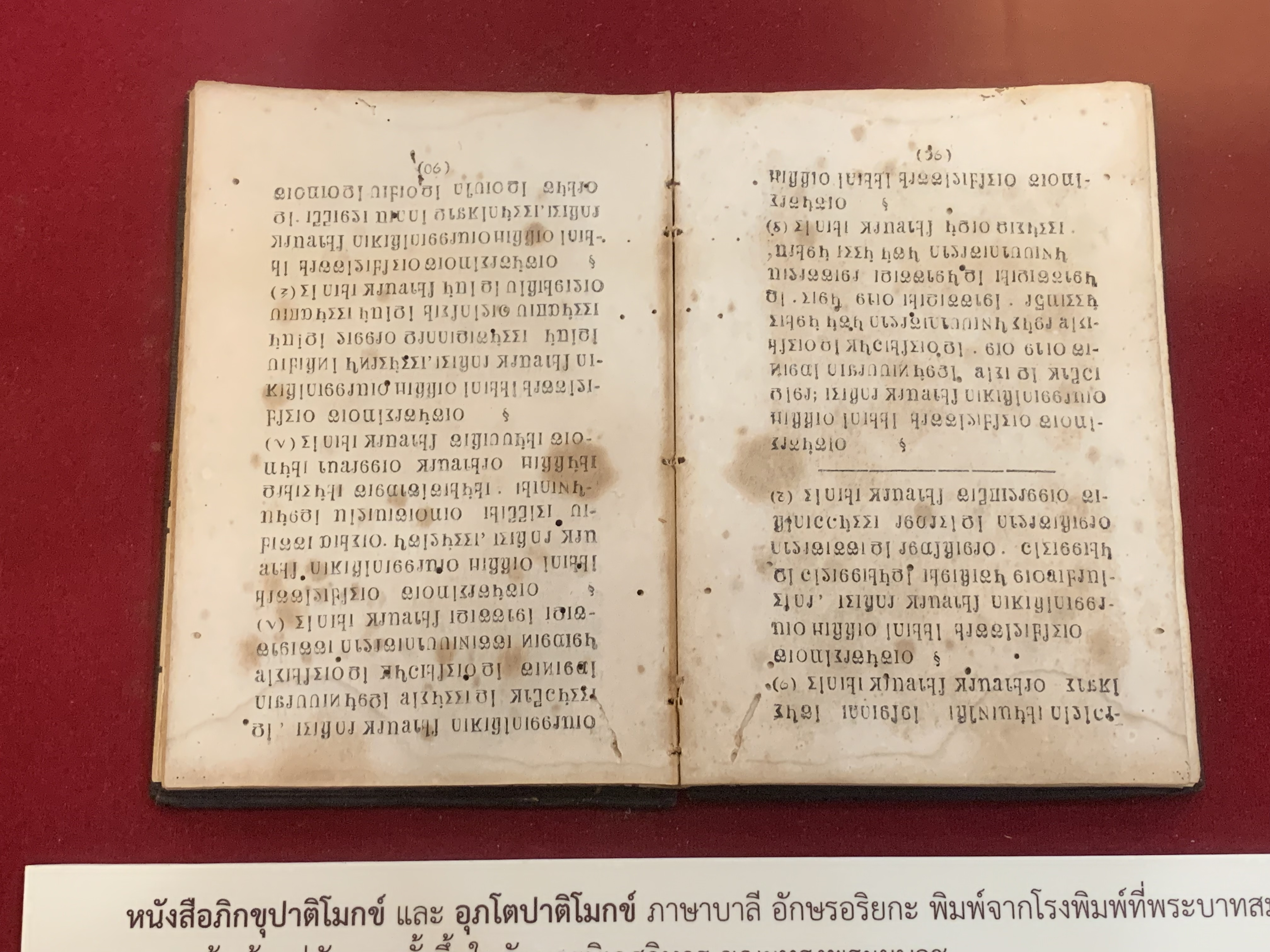 หนังสือภาษาบาลี ตีพิมพ์ด้วยอักษรอริยกะ ซึ่งรัชกาลที่ ๔ ทรงคิดค้นขึ้น ภาพนี้เป็นฉบับจริงที่จัดแสดงในพิพิธภัณฑ์วัดบวรนิเวศ